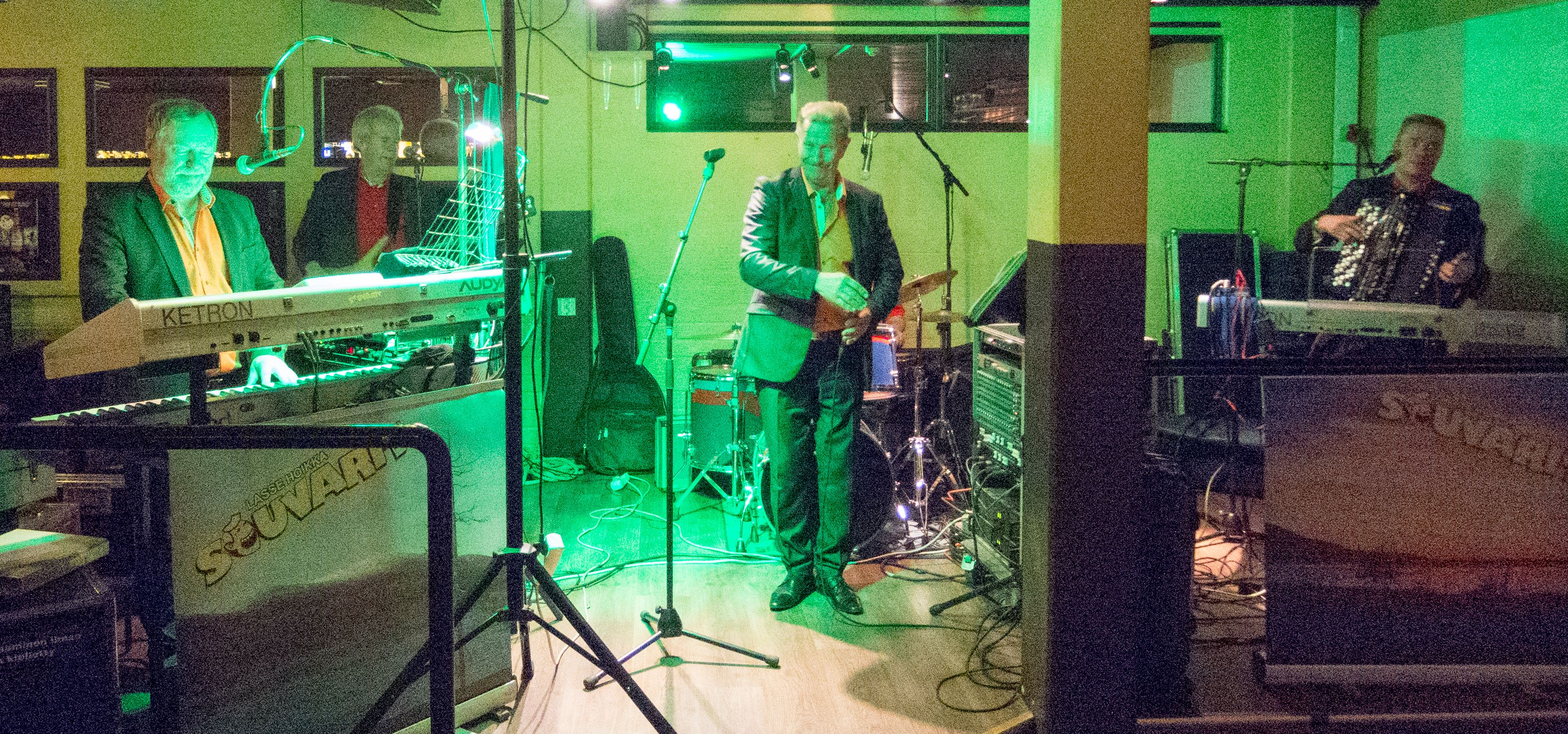 Souvarit, suomalainen tanssiyhtye